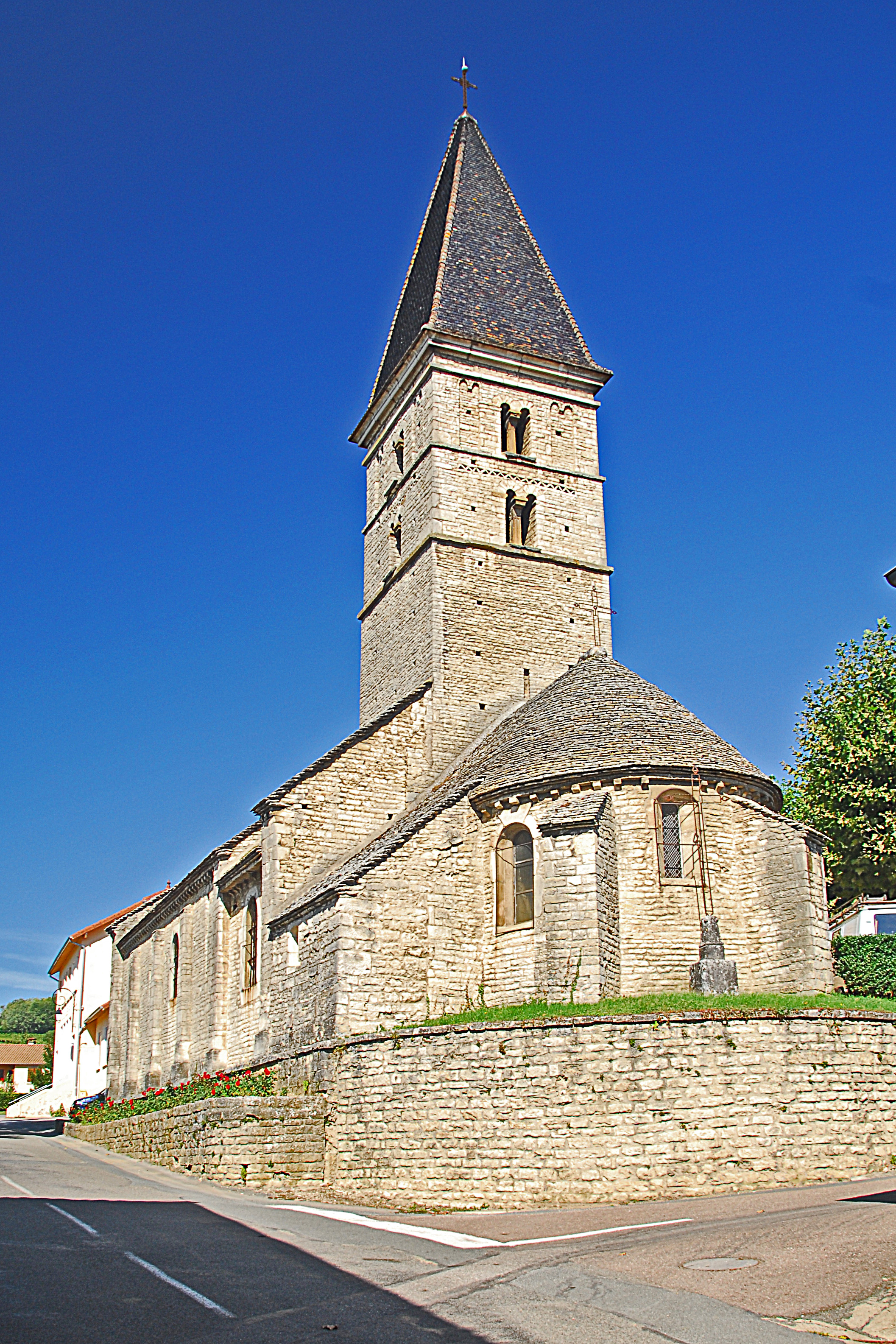 St-Bathélémy,_Farges,_von_SO, Hasndskizze